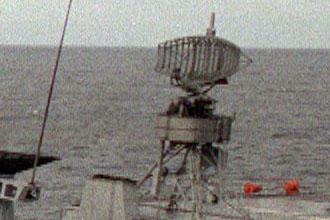 Радар DA-08 фирмы Thales (бывшая Signaal) на немецком фрегате F207 «Бремен»